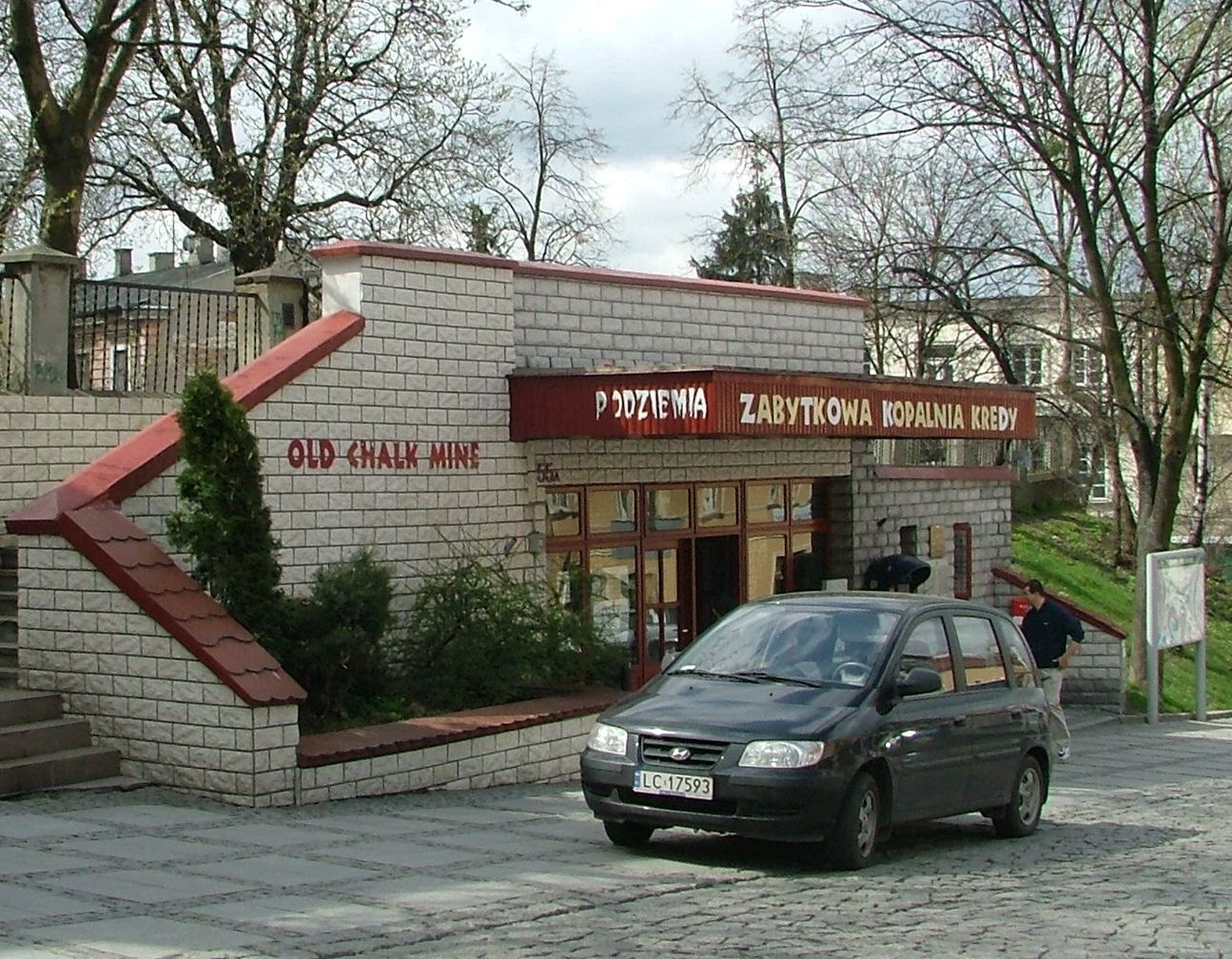 Chełm - wejście do podziemi, Zabytkowa Kopalnia Kredy